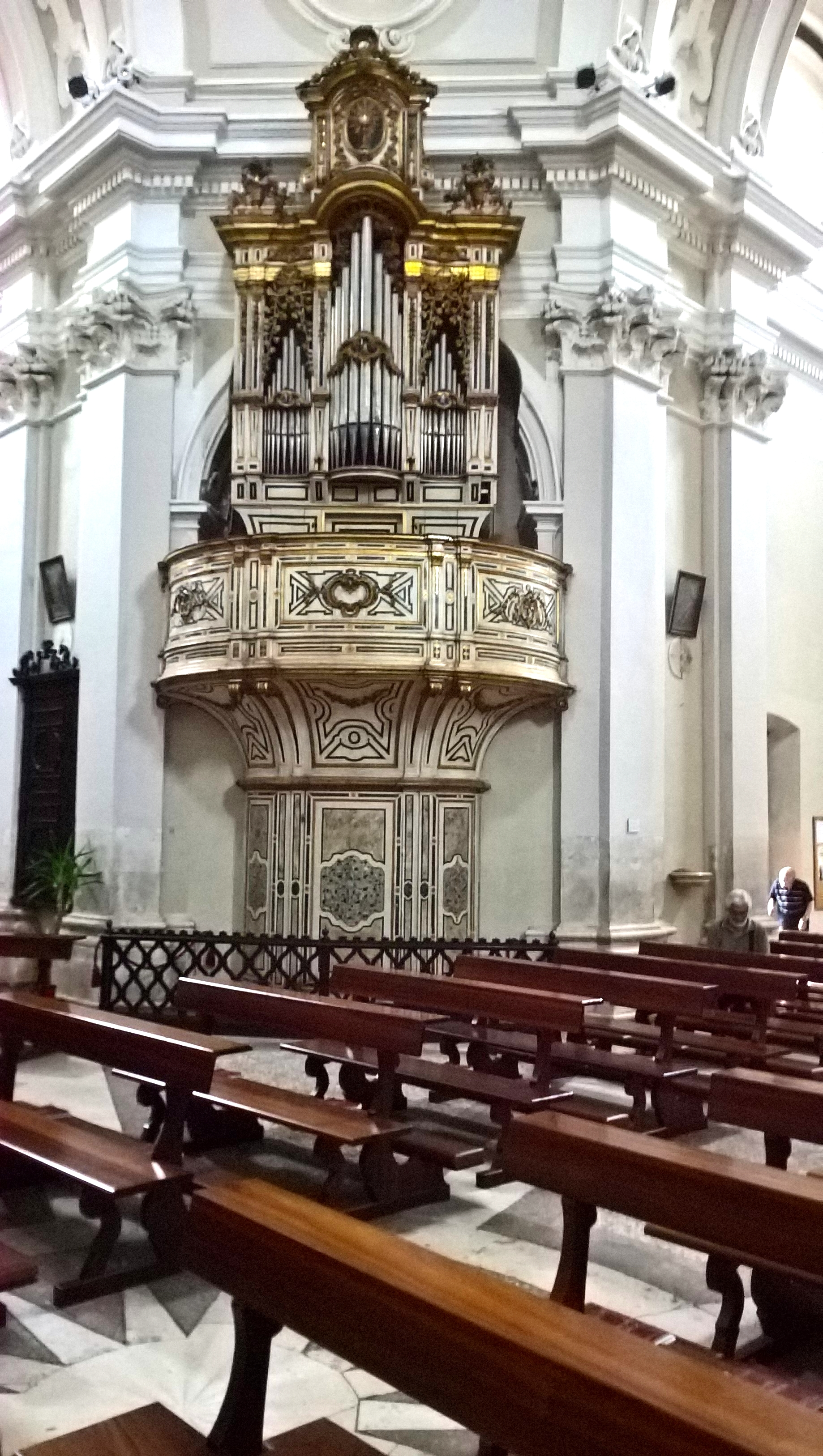 Basilica di Santa Maria Assunta - Una delle due cantorie gemelle (organo)